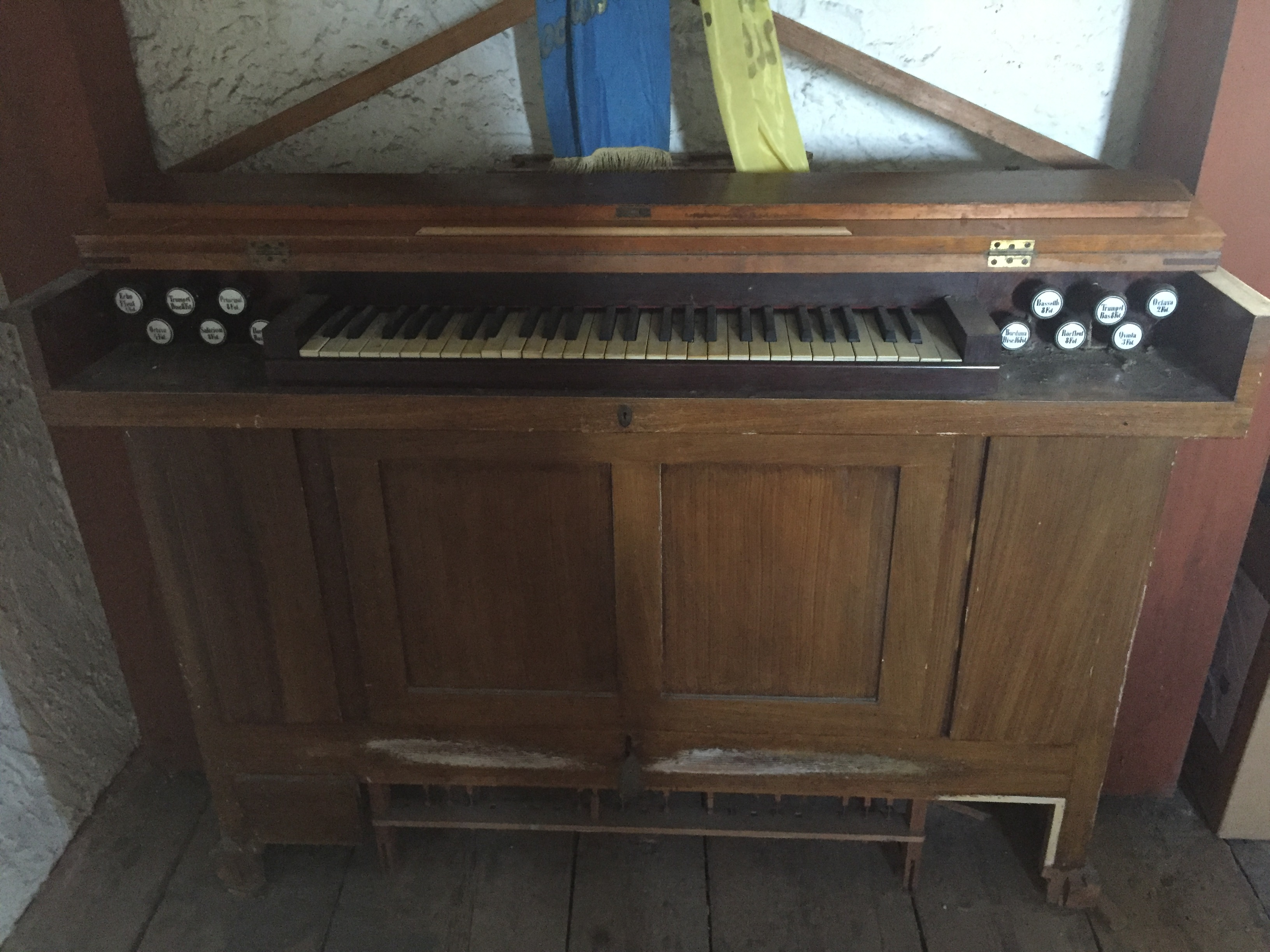 Åkerman & Lunds orgels spelbord från 1878 i Stenåsa kyrka. Spelbordet står i ett av tornrummen.